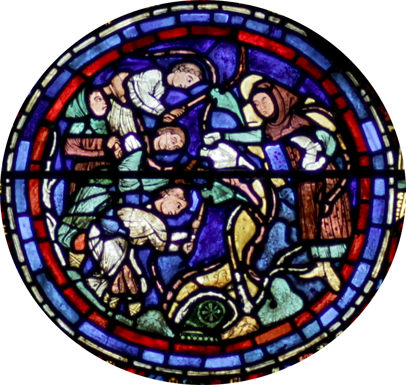 le zodiaque et les travaux des mois (lancette gauche, baie 28a). Vignerons donateurs.